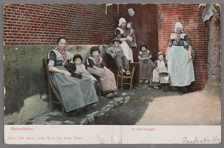 Bunschoten In het steegje. Drie vrouwen en zes kinderen tegen de muur van een huis Maker fotograaf: Boer, Adr. (Baarn) uitgever: H.J. den Boer, Baarn Vervaardigingsjaar 1900 - 1905 Omschrijving Van links naar rechts: zittende vrouw met zwarte ondermuts, hele ode doek over korte lichte kraplap, licht schort zonder stukje. Meisje met pluummuts. Meisje met pluummuts, hele rode doek over lichte kraplap, licht schort zonder stukje, klompen. Zittend bovenop een kakstoel een jongetje met hoed, boezeroen, broek en klompen. Een staande vrouw met kanten muts, hele rode doek over lichte kraplap, licht schort zonder stukje. Op de arm een kindje met klapmuts, jurkje en heel schort. Staand een meisje met pluummuts, kraplap en lieffiessjullek, met klompen. Een jongen met kruiwagen in de rokken, een jurkje met heel schort en een hoedje. Staand een vrouw met kanten muts, kleine kraplap met hele rode doek, mouwen totop de ellebogen, een licht schort zonder stukje, en klompen. Type object ansichtkaarten